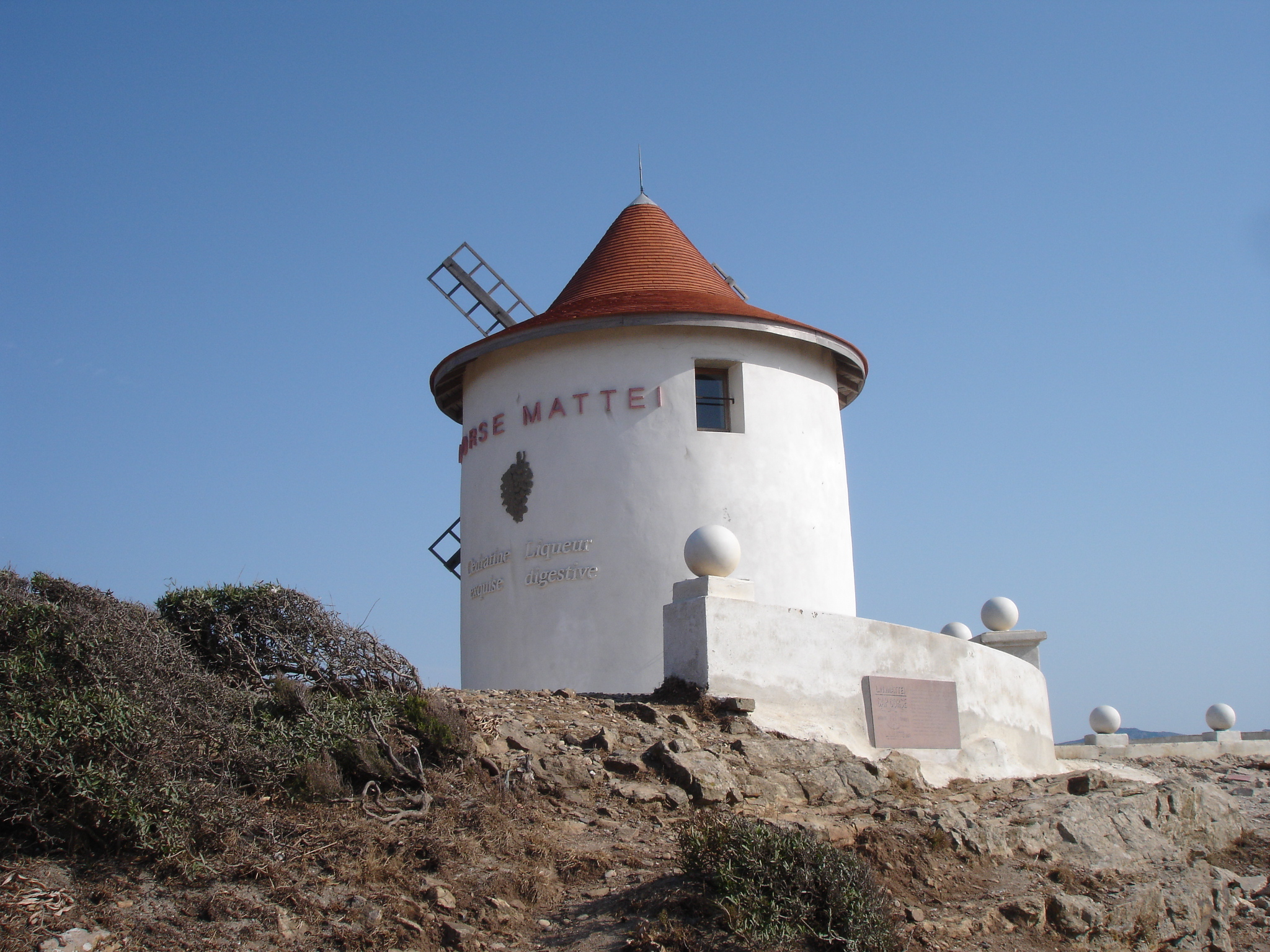 France, Haute-Corse (2B), Ersa, moulin Mattei